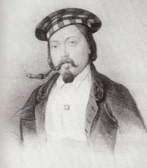 Anton Höchl (1820 - 1897), Porträt-Aquarell